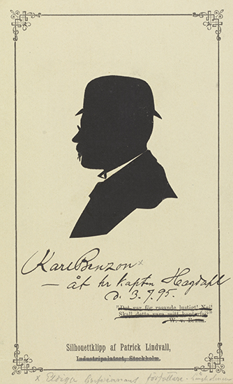 Karl Benzon (1862-1914)